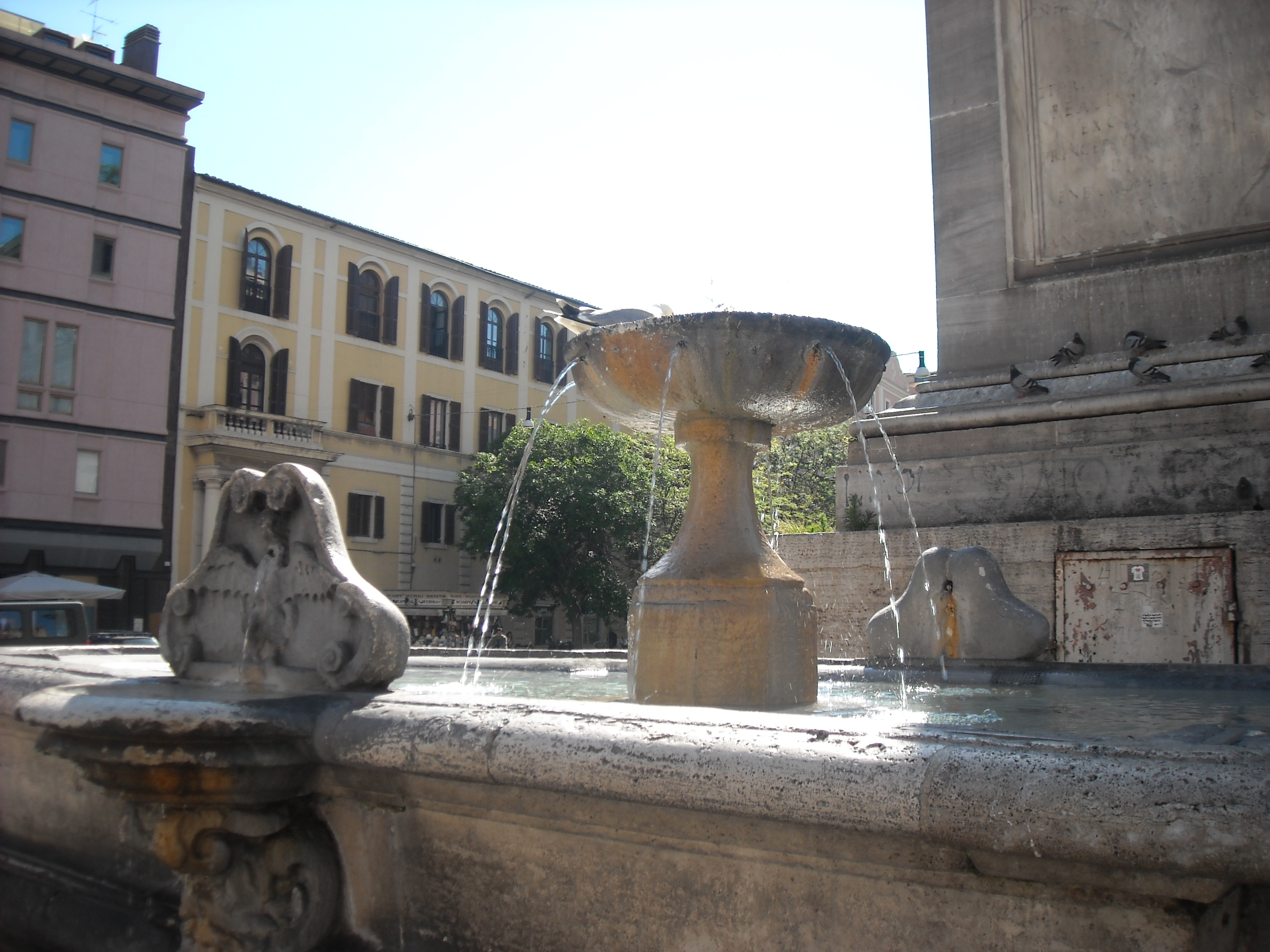 La fontana in piazza Santa Maria Maggiore a Roma